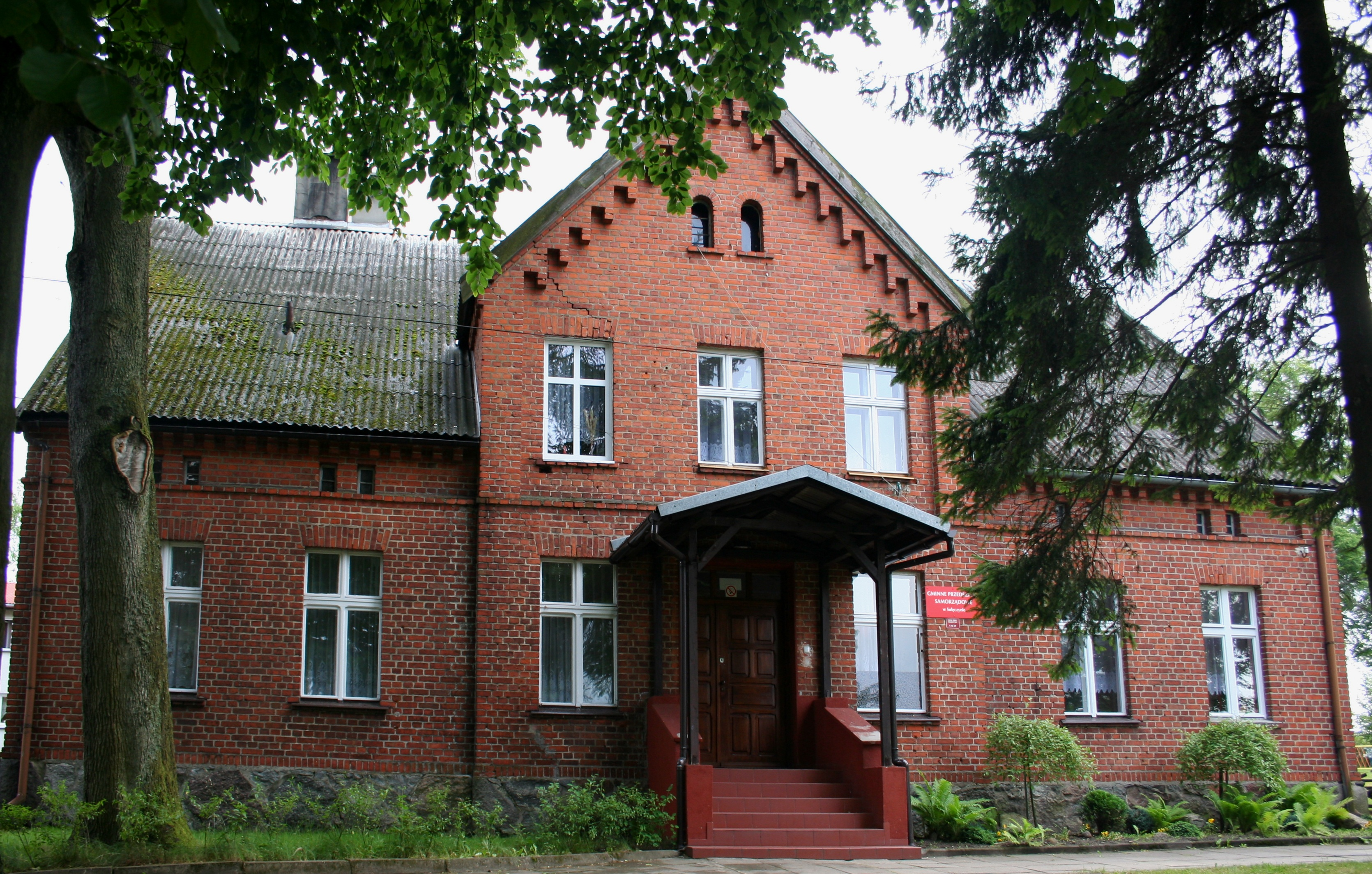 Przedszkole w Sulęczynie, woj. pomorskie, dawna plebania (pastorówka) ewangelicka wzniesiona przy zburzonym po 1945 r. kościele ewangelickim. Former Protestant vicarage in Sulęczyn